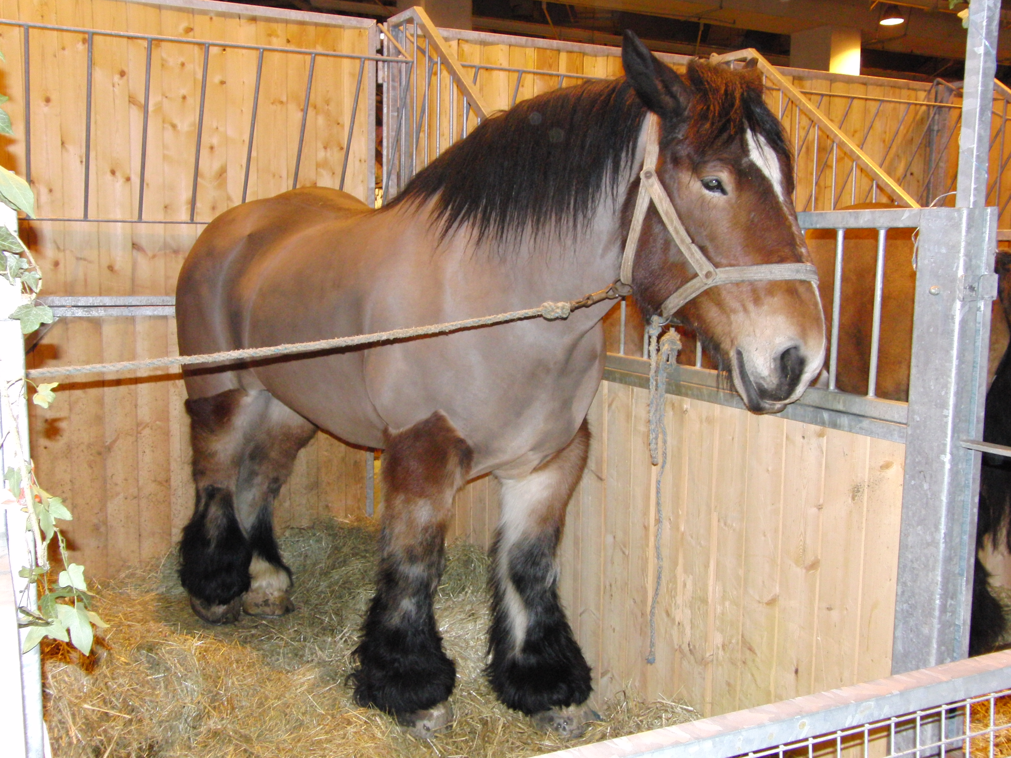 Trait du Nord - Salon de l'Agriculture 2010